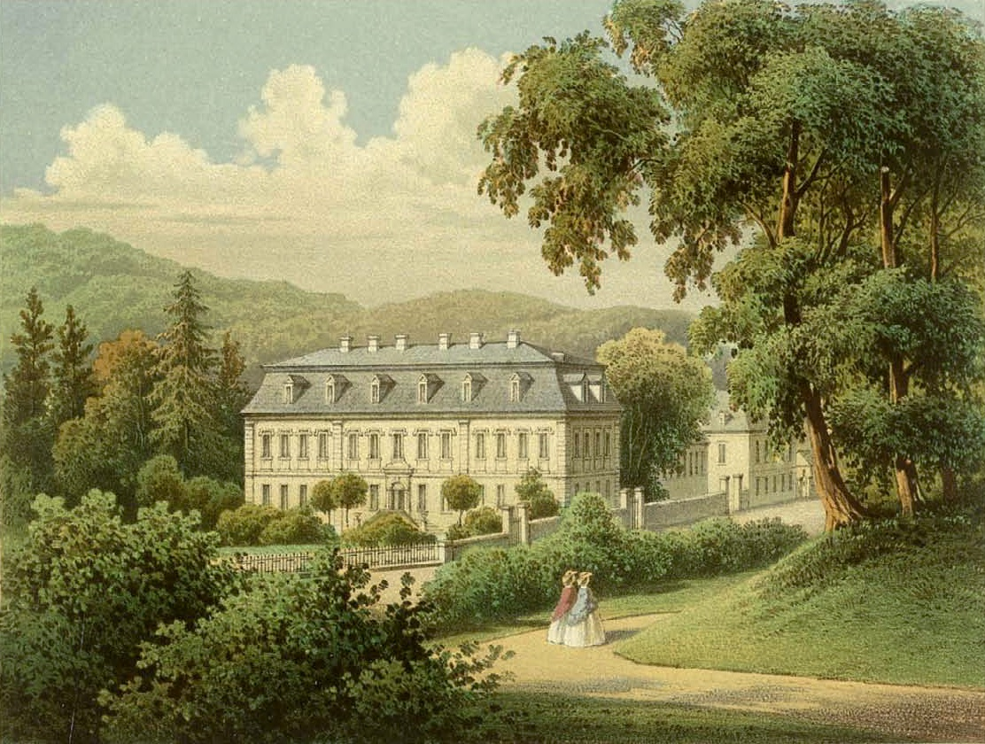 Schloss Meisdorf, Mansfelder Gebirgskreis, Provinz Sachsen